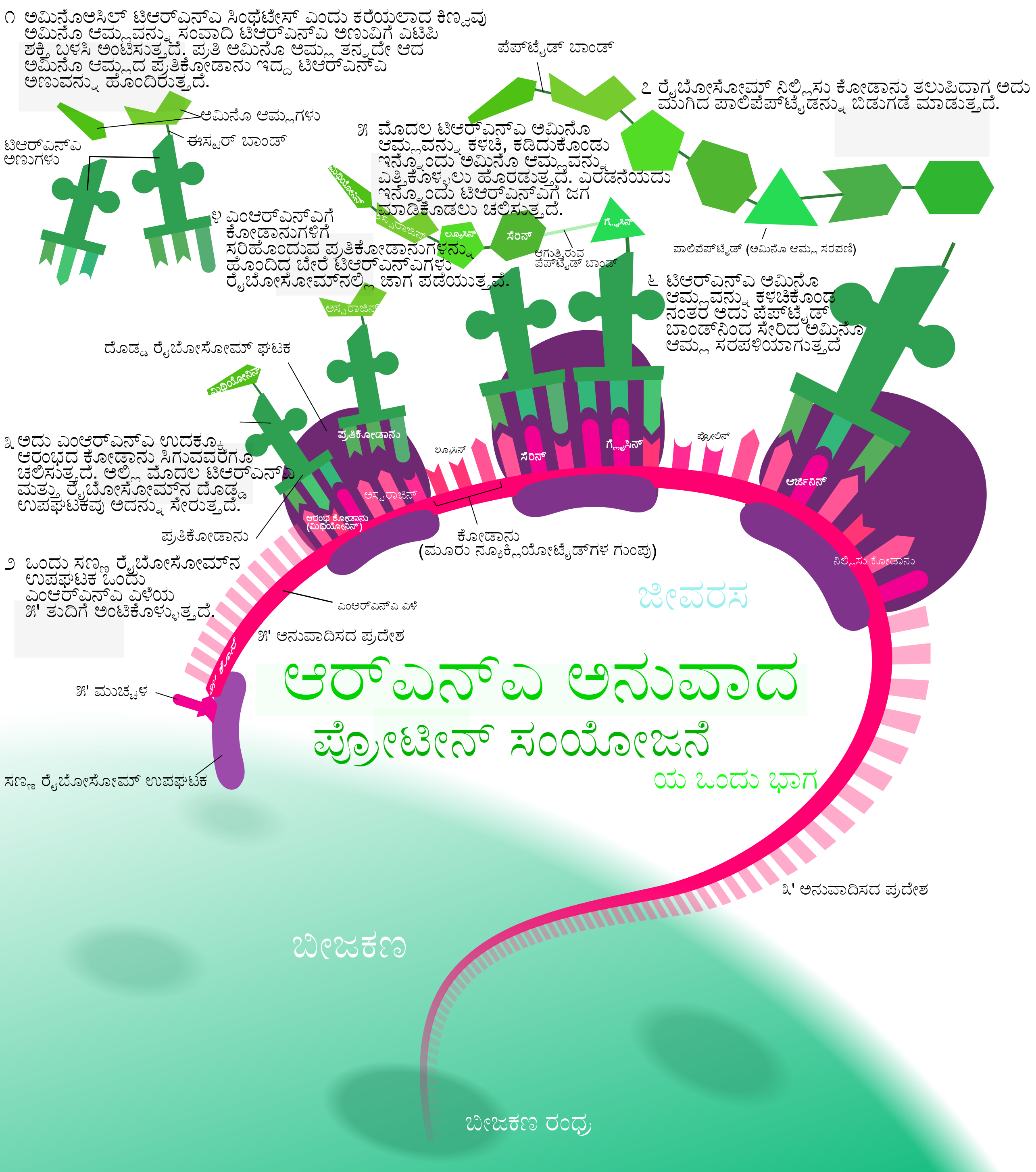 ಕನ್ನಡ: ಪ್ರೋಟೀನ್ ಅನುವಾದ ಪ್ರಕ್ರಿಯೆಯನ್ನು ತೋರುವ ಚಿತ್ರ.